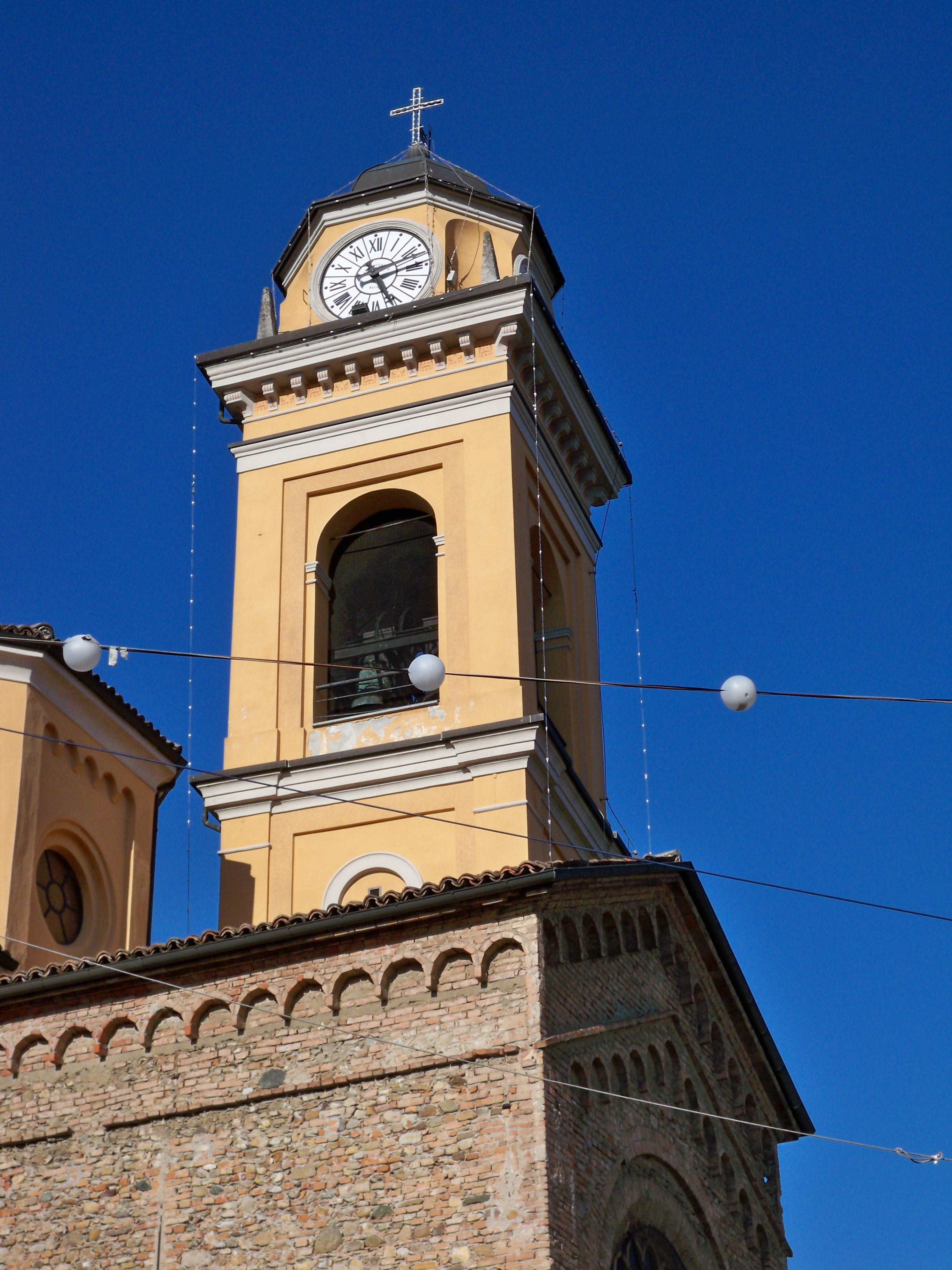 Dettaglio del campanile della chiesa di Cassano Spinola (AL)